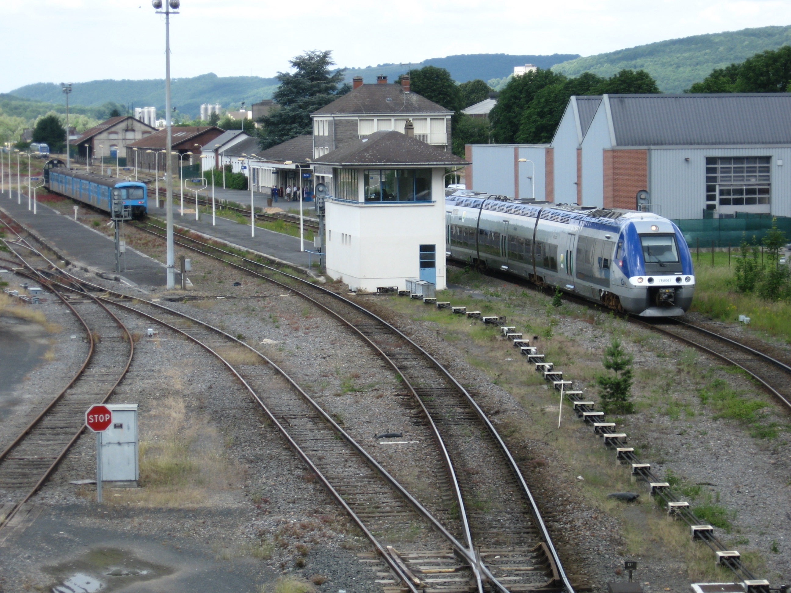 Overzicht van het station van Givet met een getrokken trein dieseltreinstel